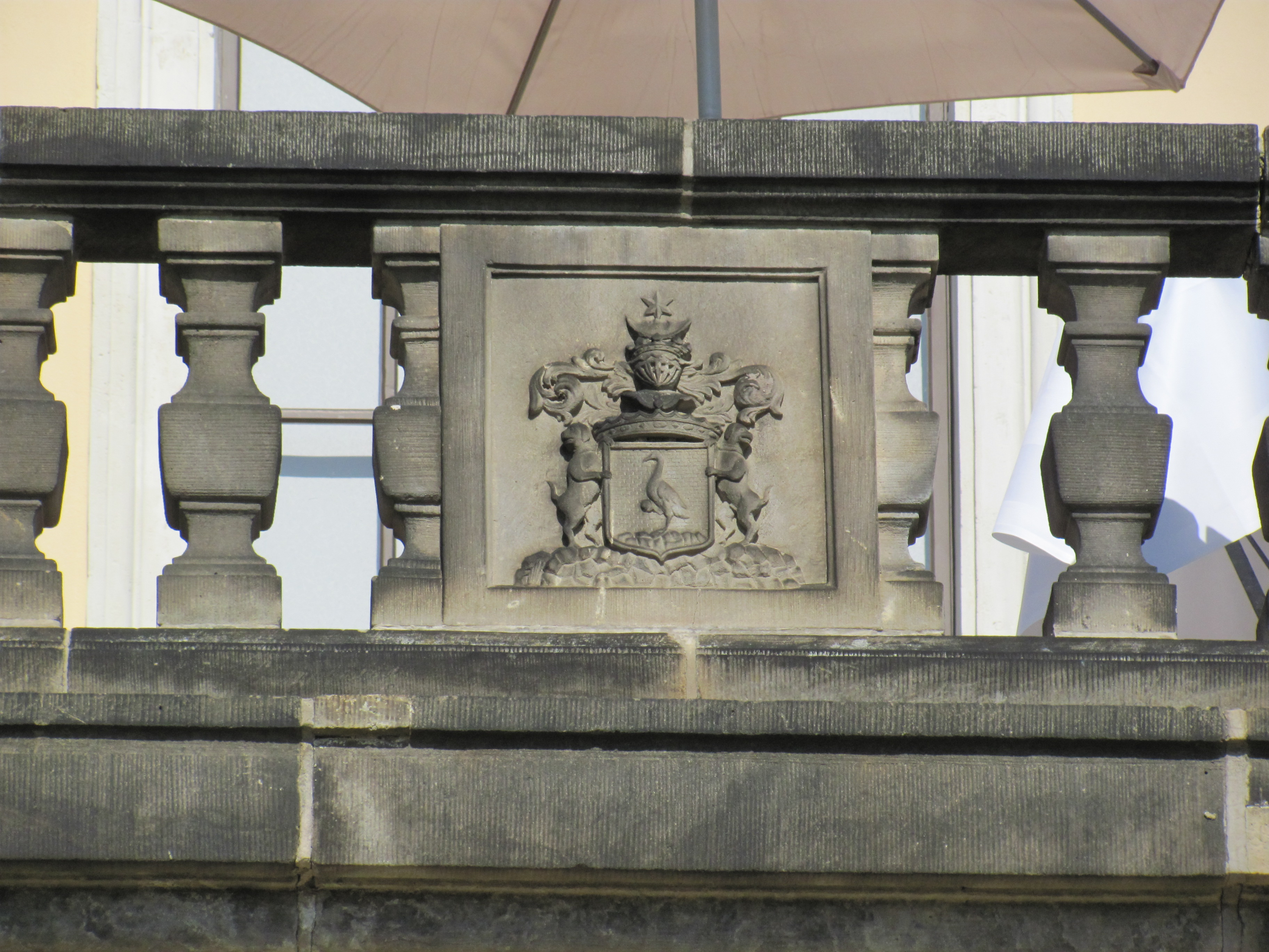 Radebeul Belvedere mit Brunnen